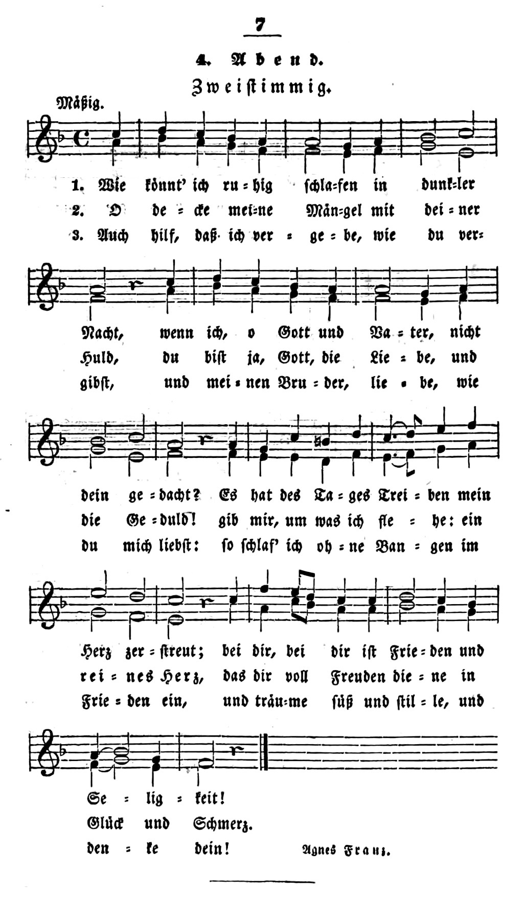 Kindernachtgebet Wie könnt ich ruhig schlafen von Agnes Franz mit der Melodie von Friedrich Silcher, die später mit Julie Hausmanns So nimm denn meine Hände berühmt wurde